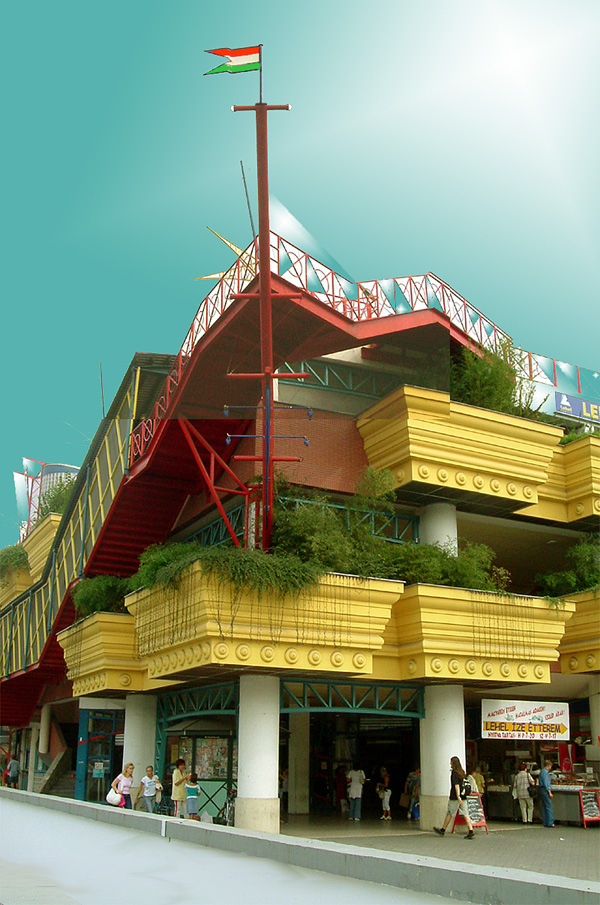 Lehel Csarnok (Budapest XIII.), tervezte Rajk László, 2002